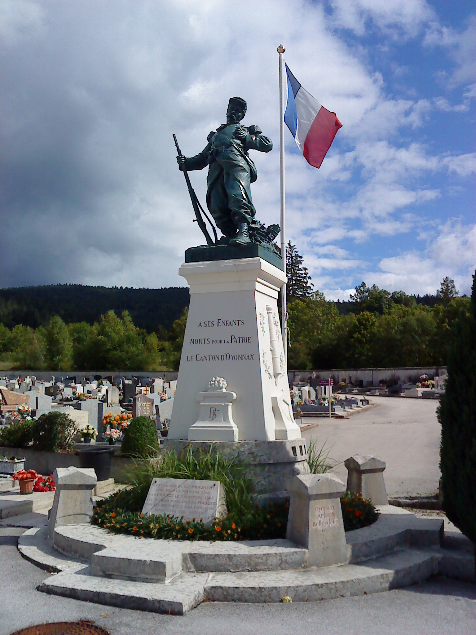 Le « François », monument au mort situé : au parc René-Nicod d'Oyonnax avant 1945 ; au cimetière d'Oyonnax après.